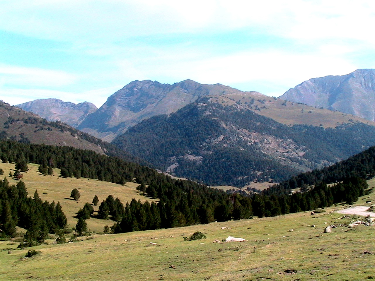 Vall de la Noguera Pallaresa a Montgarri (Vall d'Aran) This is a a photo of a natural area in Catalonia, Spain, with id: ES510125